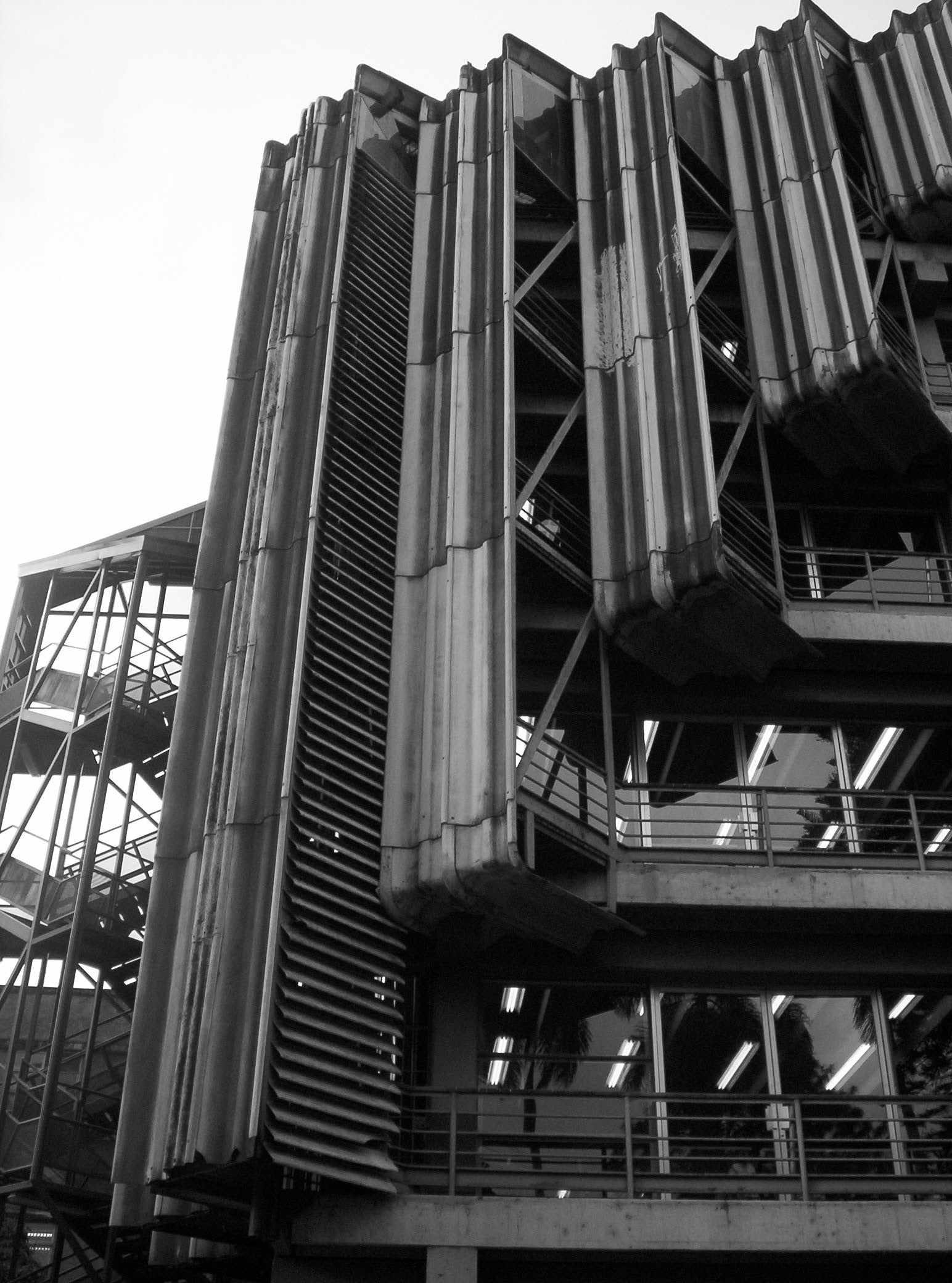 Escuela de Arquitectura de la Universidad de Costa Rica